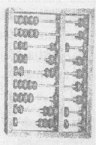 Abakusi